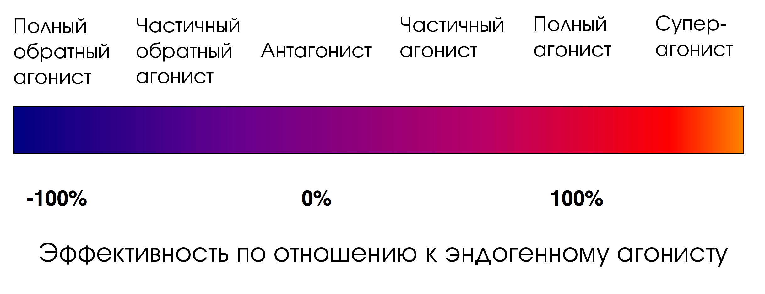 Спектр эффективности лигандов рецепторов